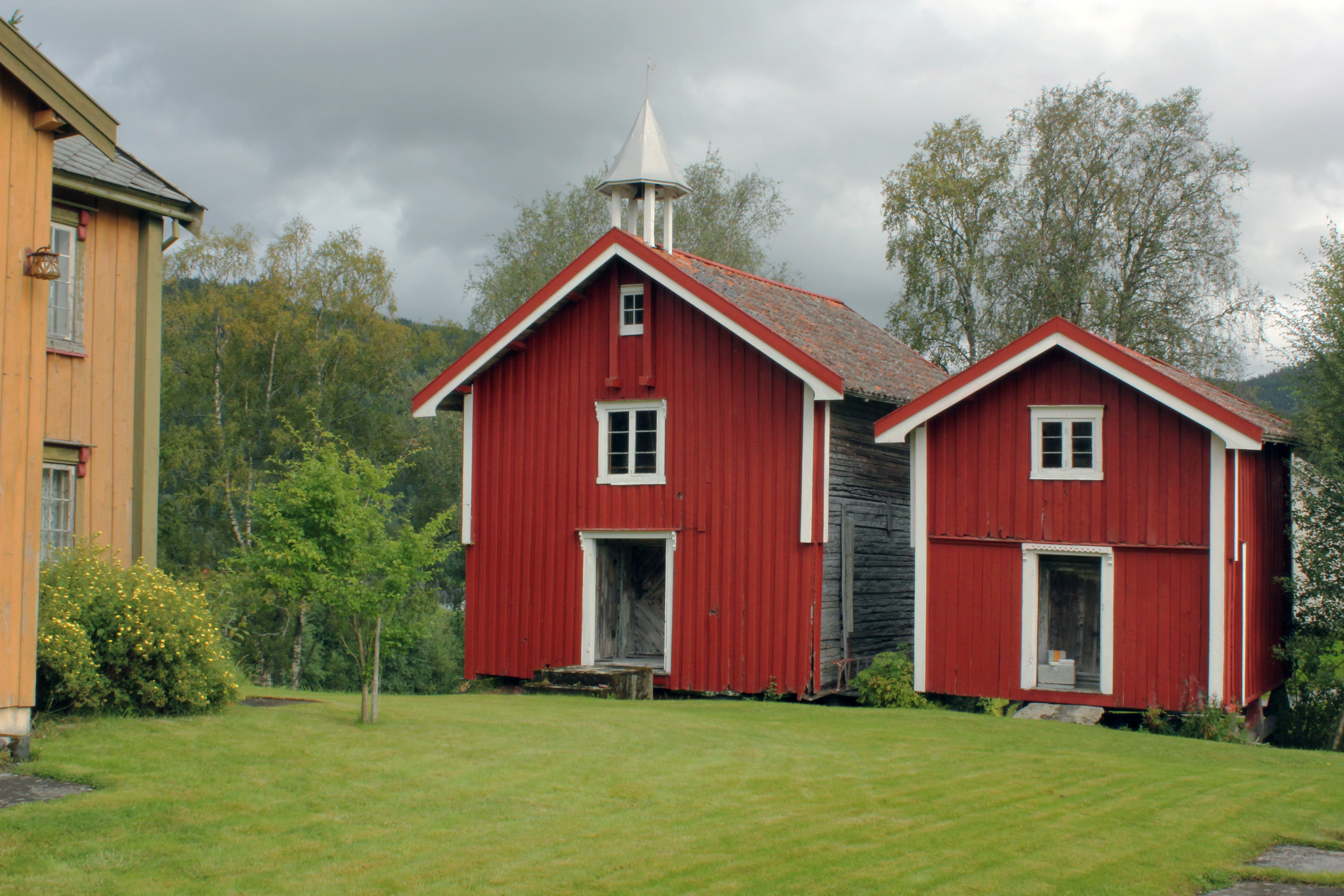 Stabburene på Gjesvold/Gjesvål, Orkdal